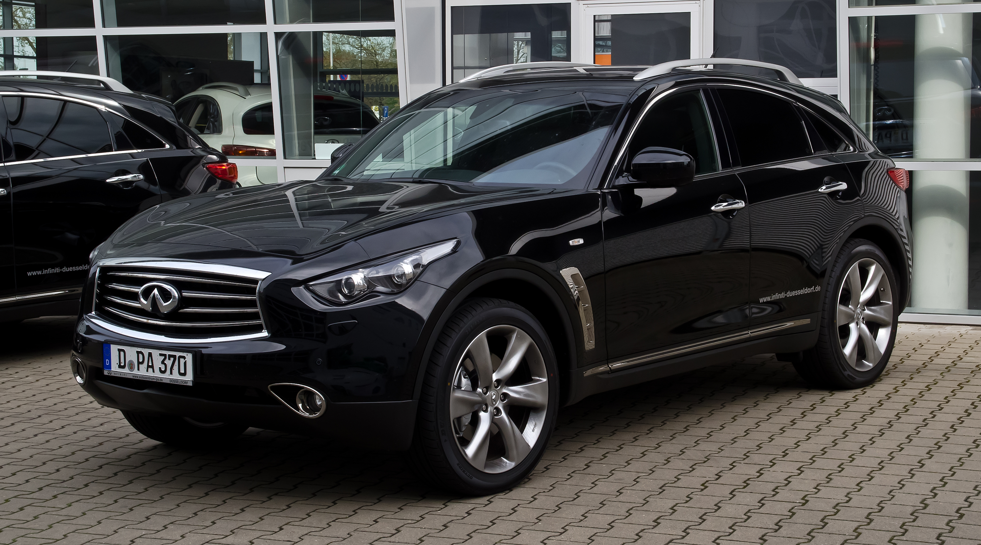 Infiniti FX50 S (S51, Facelift)